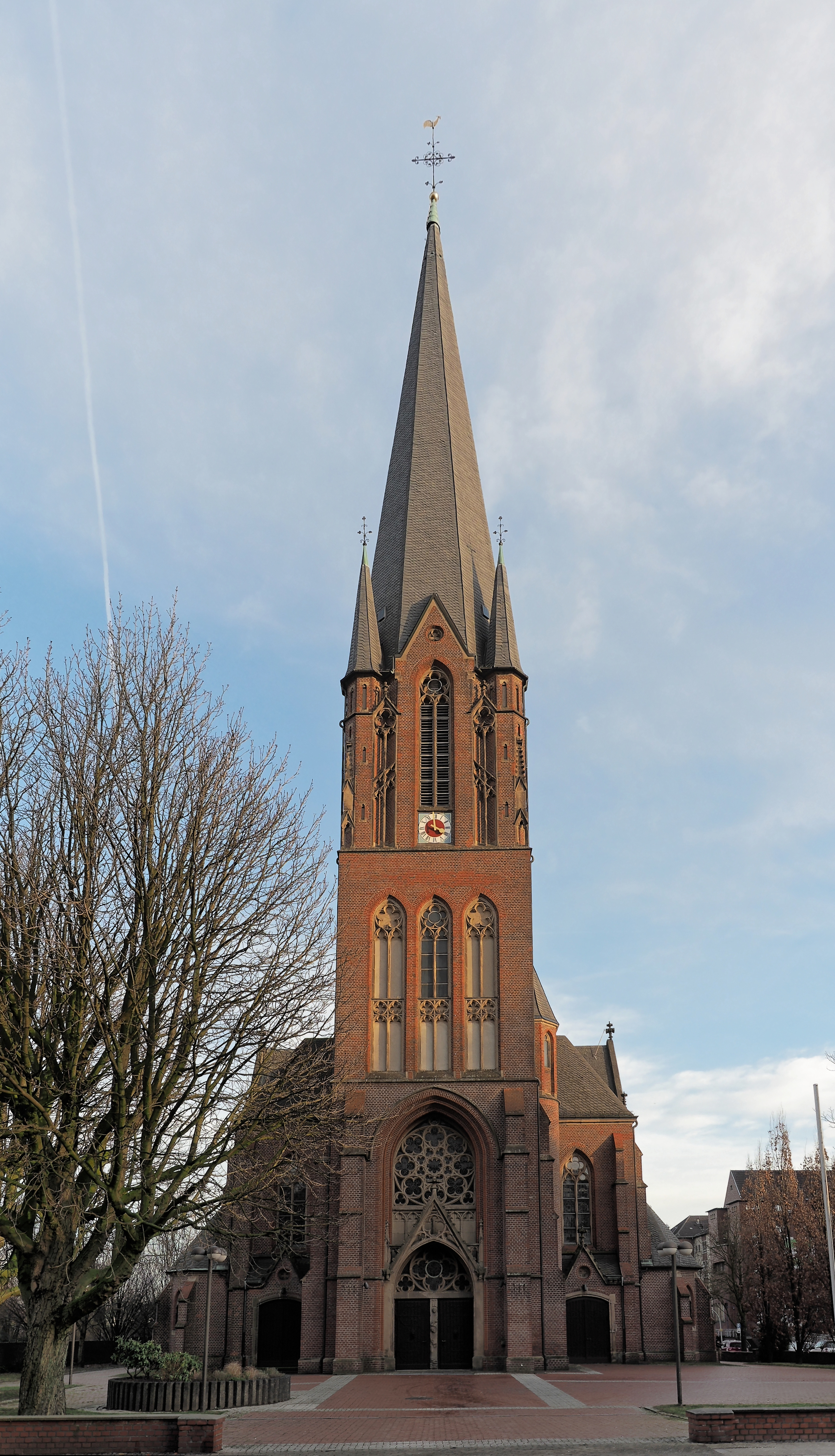 Die Kirche Sankt Peter und Paul zwischen Börnig und Sodingen im Stadtbezirk Sodingen in Herne.